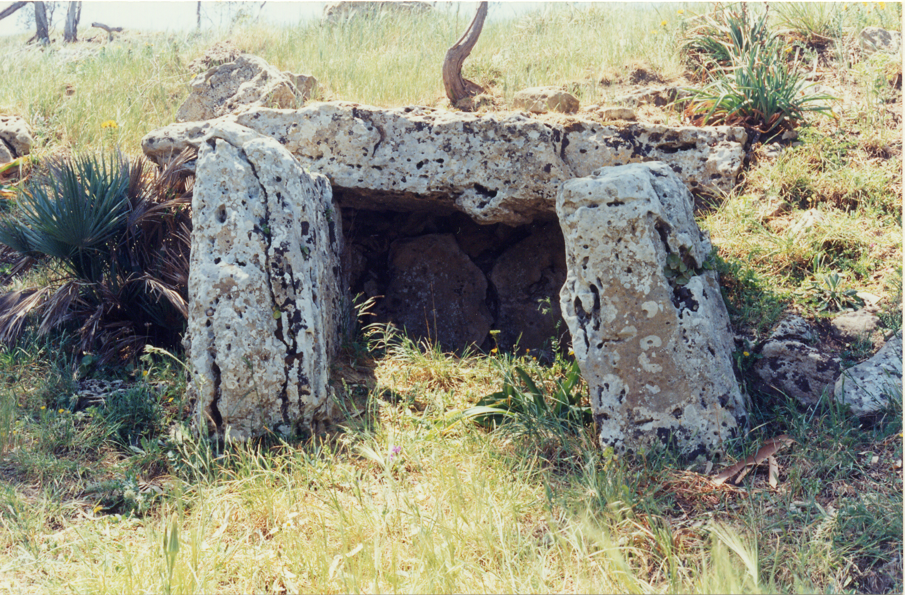 Autore: Salvatore Piccolo Fonte: dello stesso autore Descrizione: Dolmen situato sul monte Bubbonia (Sicilia)